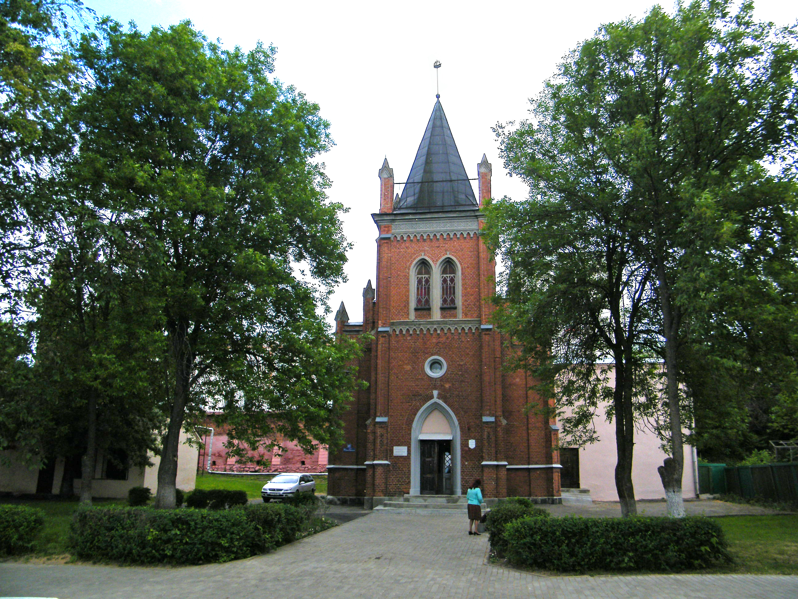 Краеведческий музей